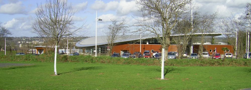 Centre aquatique de Saint-Lô